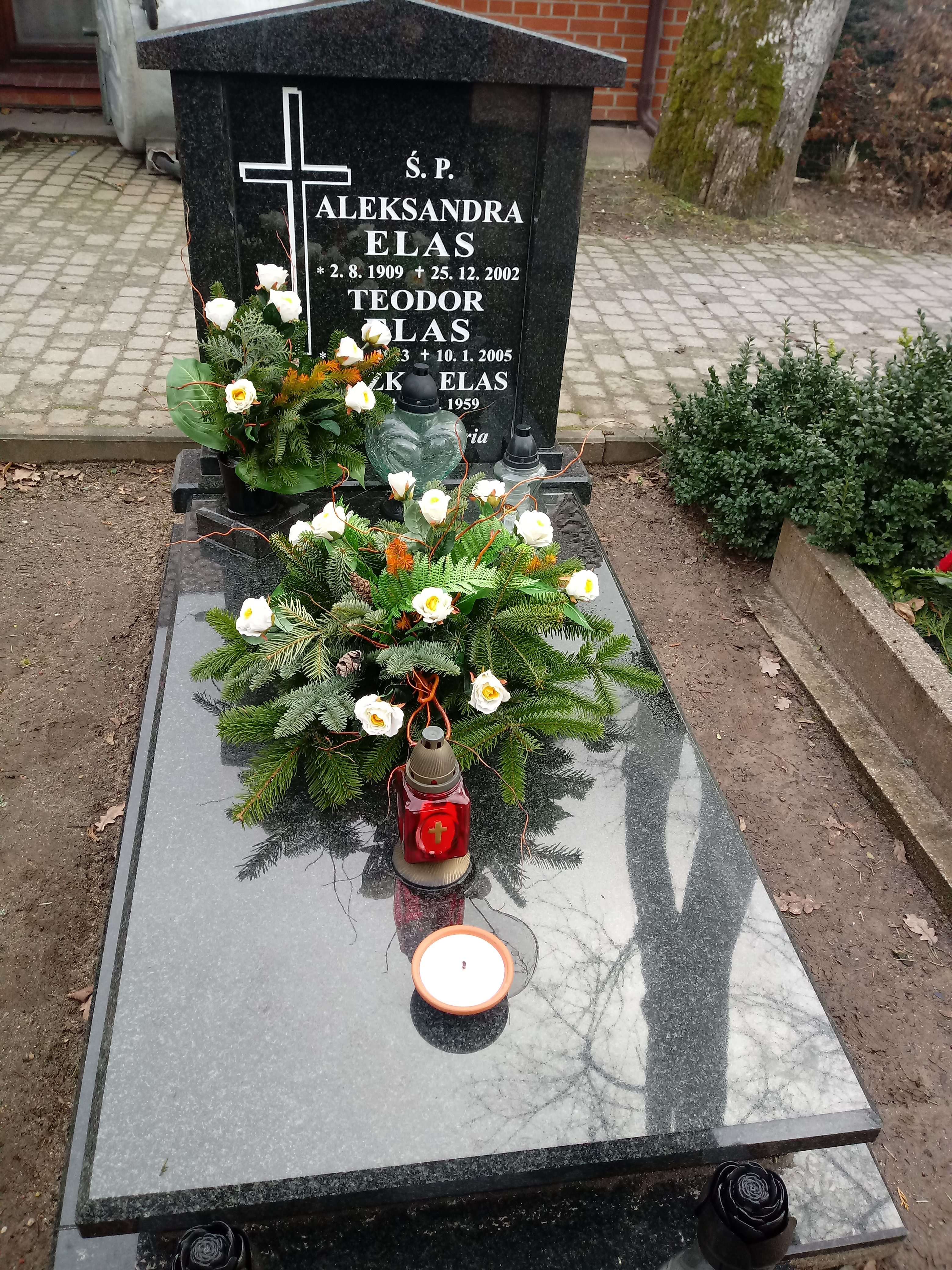 Nagrobek prof. T. Elasa znajdujący się przy kartuskiej kolegiacie